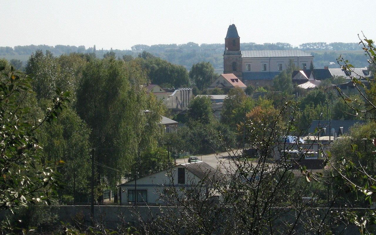 Вигляд Білогір'я (Ляхівці)